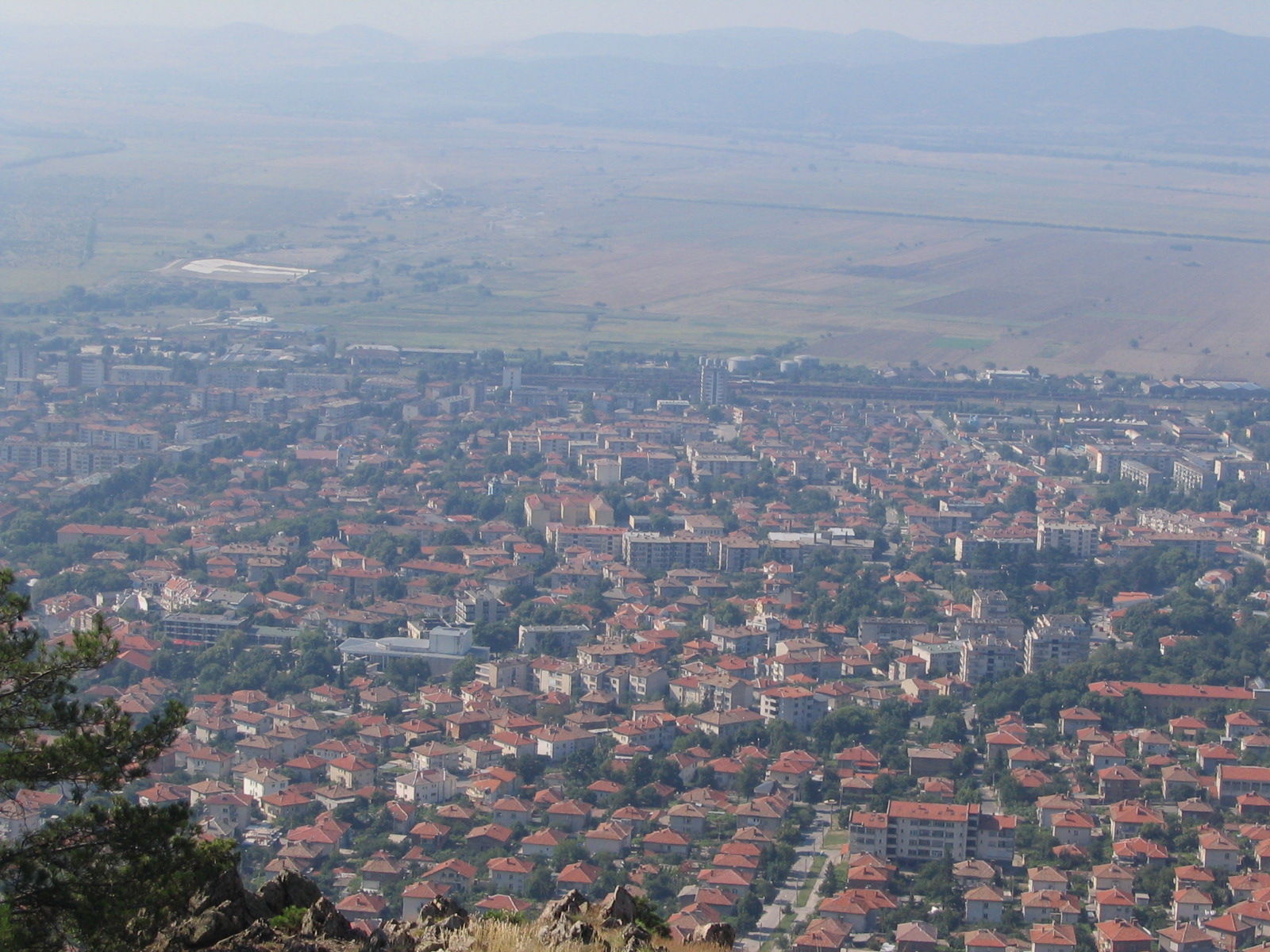 Град Карлово гледка от Стара Планина